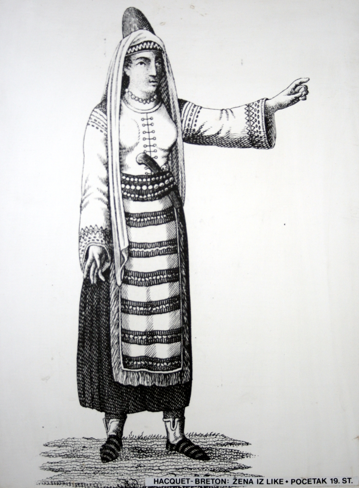 snimljeno tijekom Noći muzeja u Etnografskom muzeju u Zagrebu